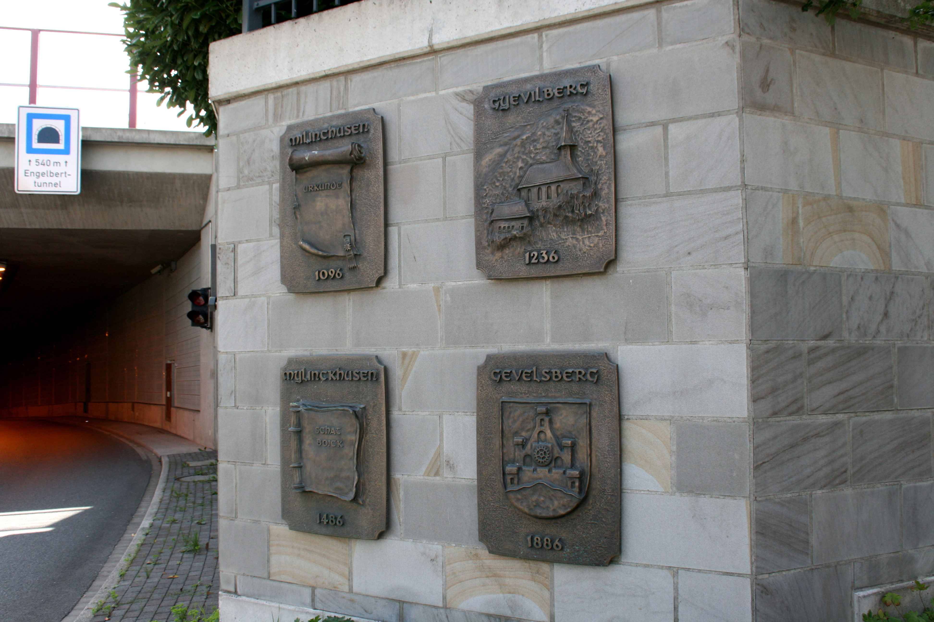 Nordende des Engelbert-Tunnels in Gevelsberg